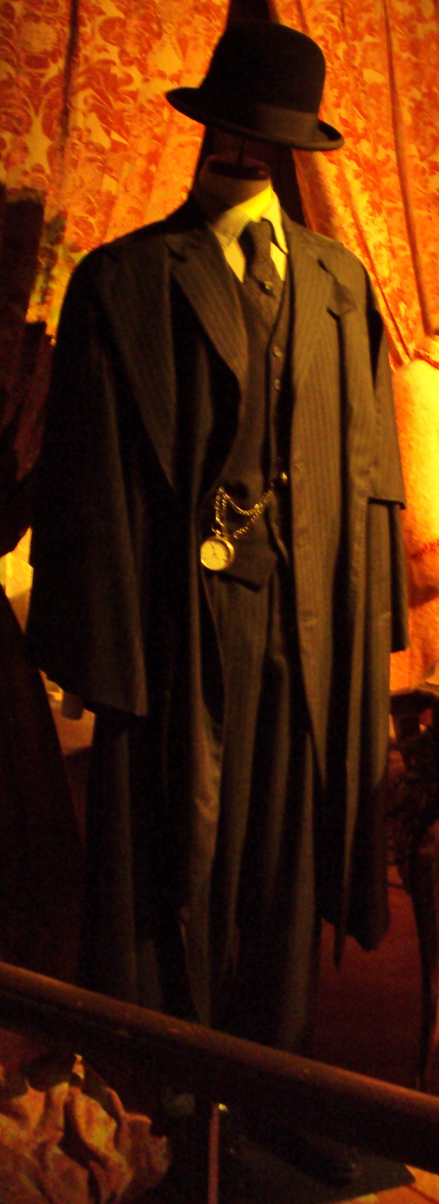 Kostuum van Cornelis Droebel (Engels: Cornelius Fudge) tijdens Harry Potter: The Exhibition in Brussel (België)